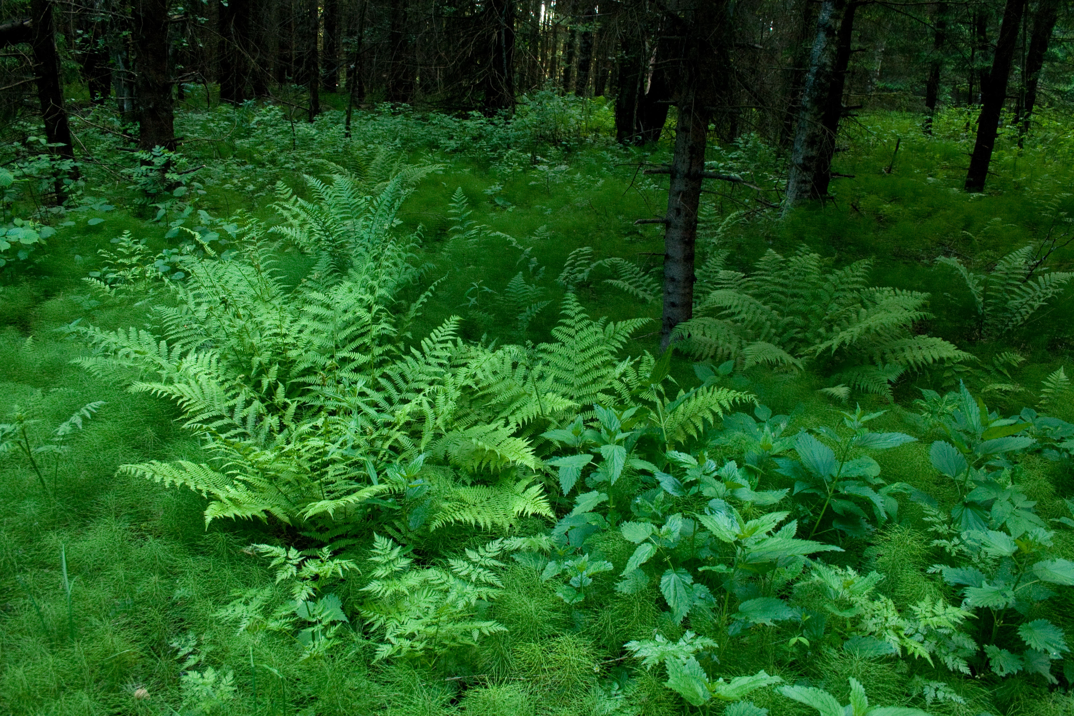 Kaadrisse püütud moment Kõrvemaa maastikukaitsealalt